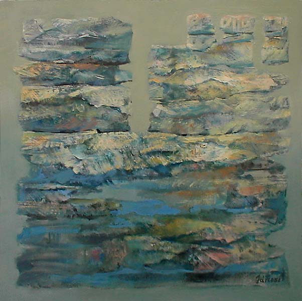 Jánosi Katalin (1951. november 2. -) magyar festő- és gobelinművész alkotása: Rétegek, 2000, olajfestmény, 80x80 cm